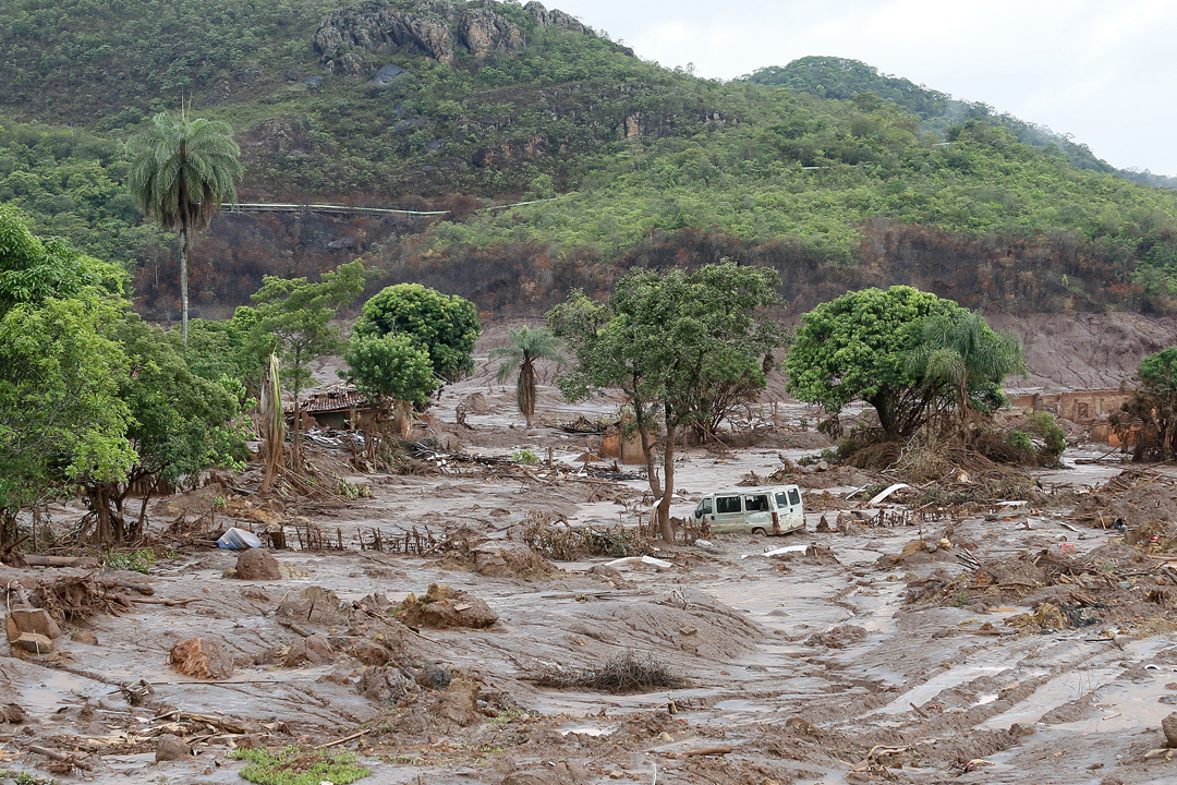 O rompimento da barragem de rejeitos da mineradora Samarco, cujos donos são a Vale a anglo-australiana BHP, causou uma enxurrada de lama que inundou várias casas no distrito de Bento Rodrigues, em Mariana, na Região Central de Minas Gerais. Inicialmente, a mineradora havia afirmado que duas barragens haviam se rompido, de Fundão e Santarém. No dia 16 de novembro, a Samarco confirmou que apenas a barragem de Fundão se rompeu. Local: Distrito de Bento Rodrigues, Município de Mariana, Minas Gerais. Foto: Rogério Alves/TV Senado